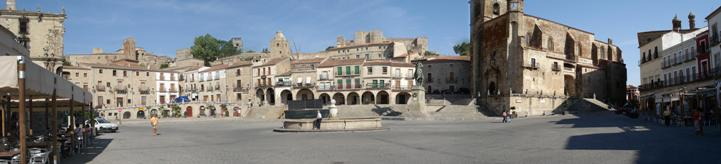 Panorâmica da Plaza Mayor de Trujillo